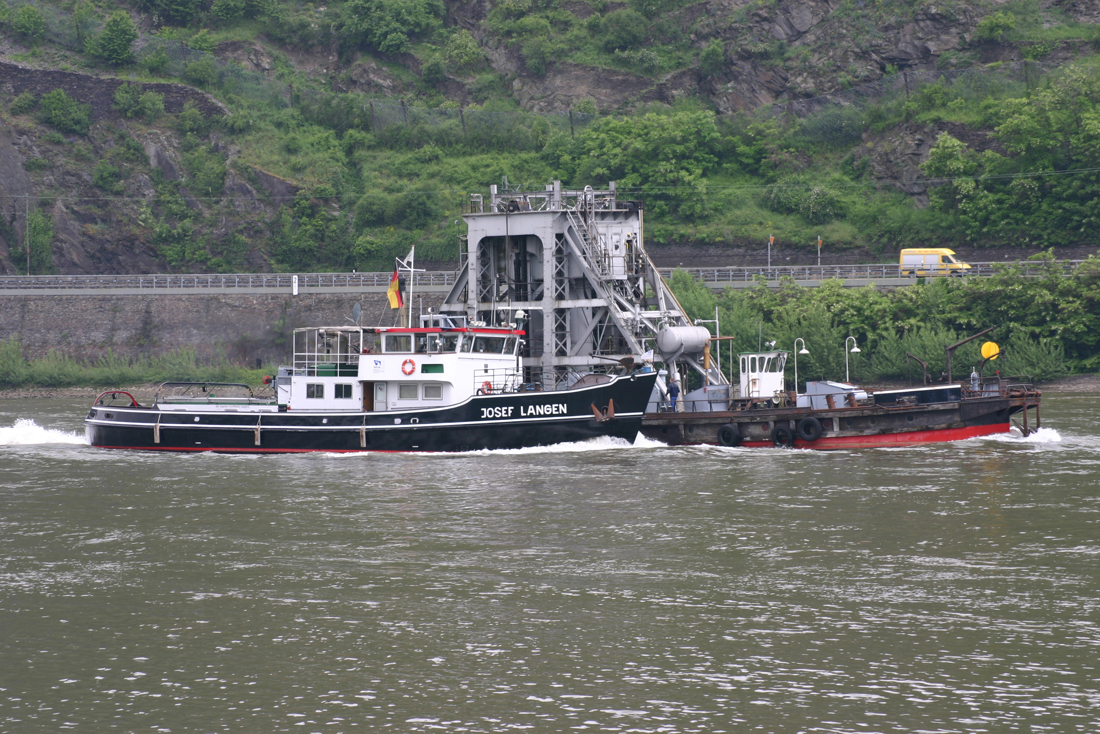 Eisbrecher Josef Langen mit Taucherschacht Kaiman